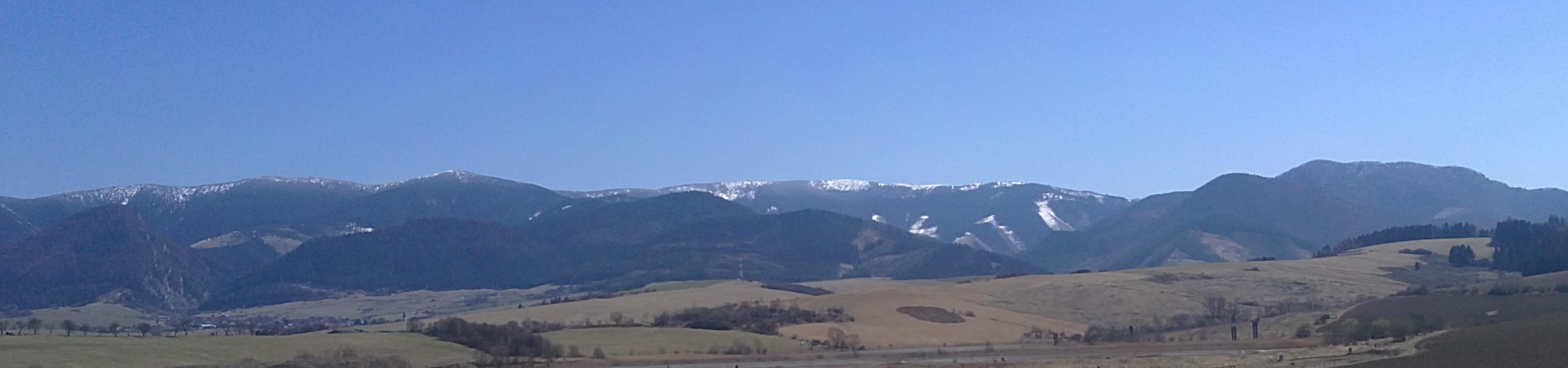 Severná časť Lúčanskej Fatry